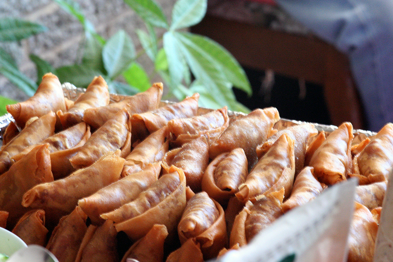 Burmese style samosas